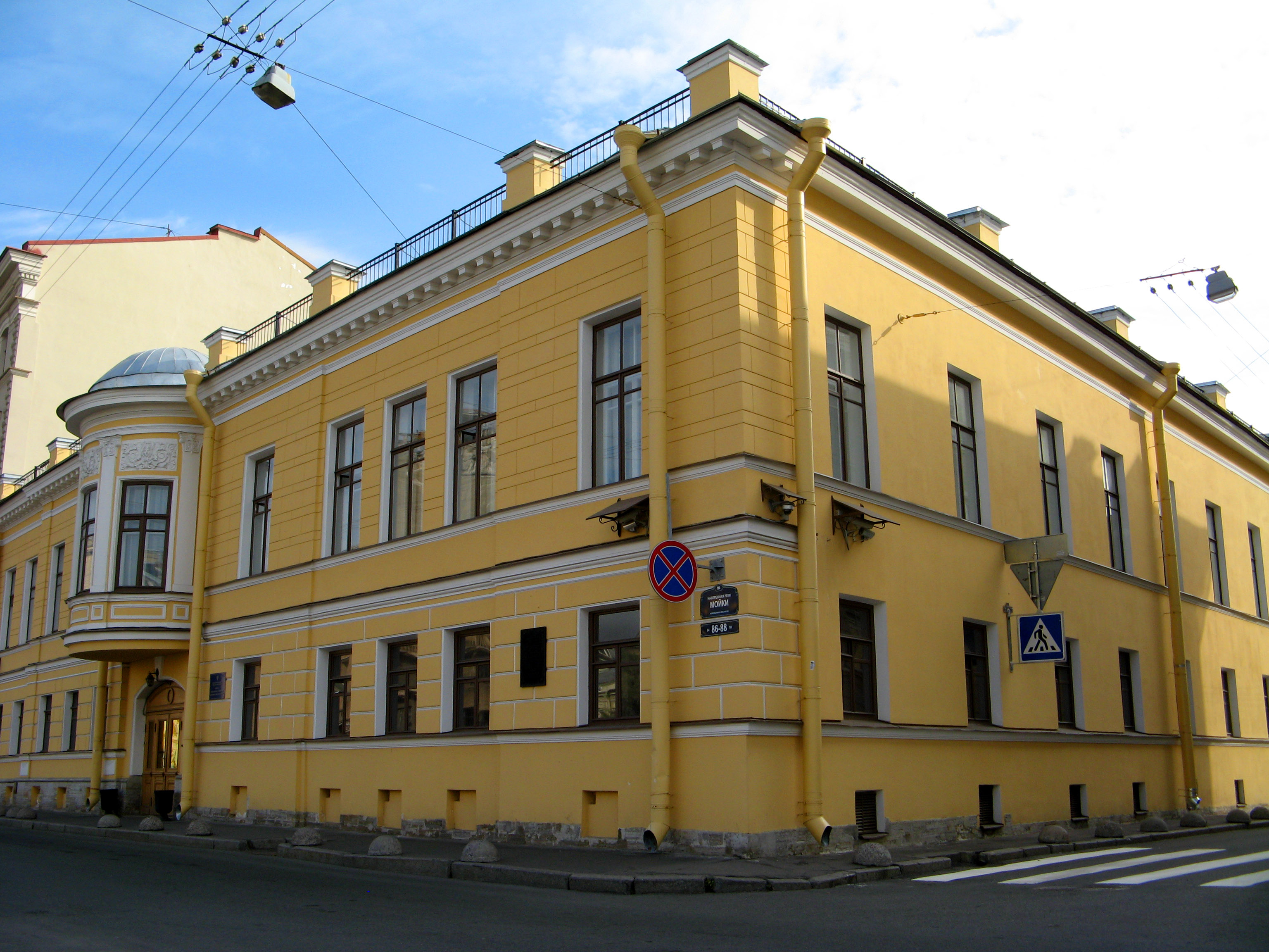 Дом Монферрана О. (Ратькова-Рожнова Я. В.). Санкт-Петербург, наб. р. Мойки, 86-88, Прачечный пер., 2.